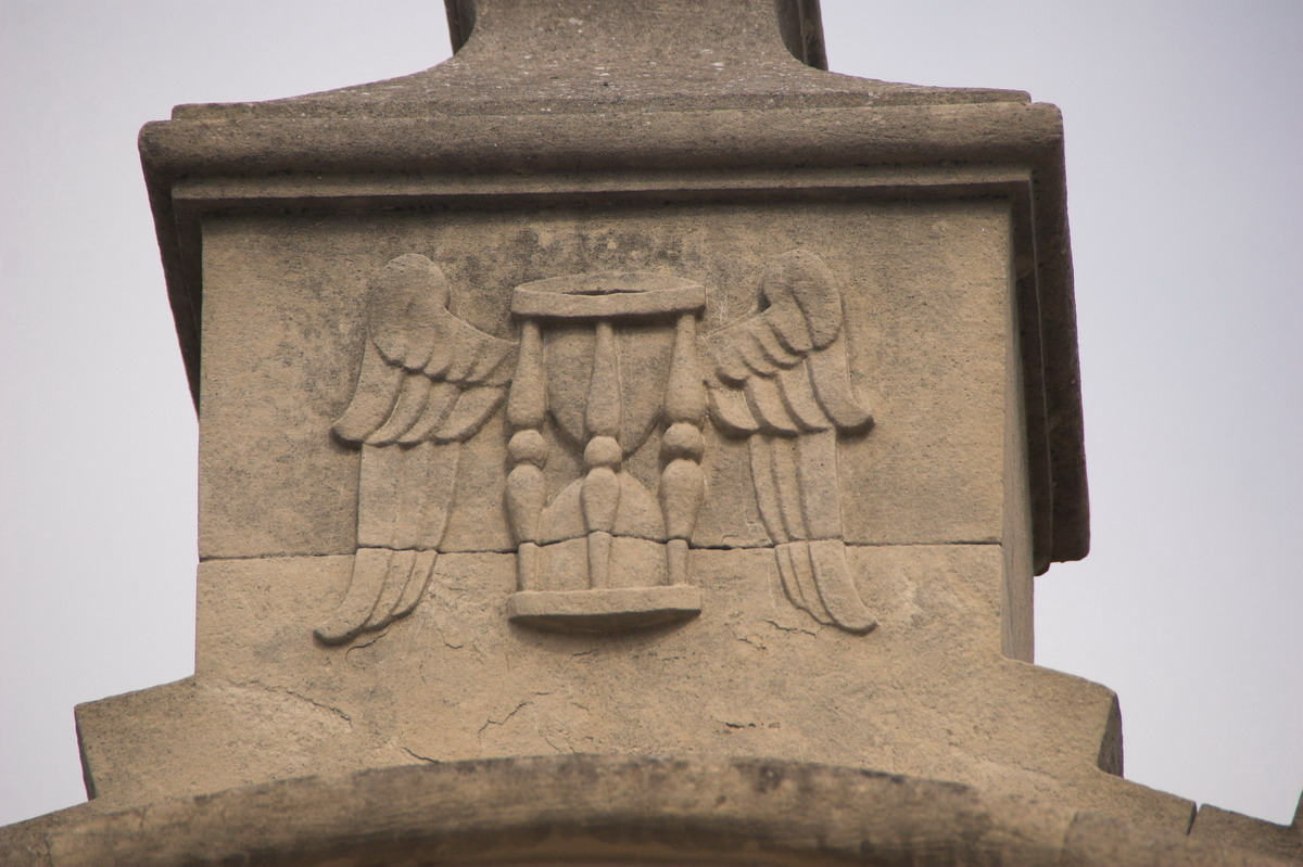 Simbol del Tempus fugit, expresat amb un rellotge de sorra amb ales (Lloret de Mar-La Selva-Catalunya), dins del cementiri modernista de Lloret de Mar (1901)